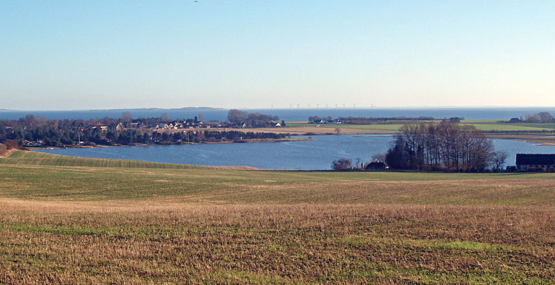 Norsminde Fjord ligger ca. 20 km syd for Århus, Århus Amt, Jylland, Denmark